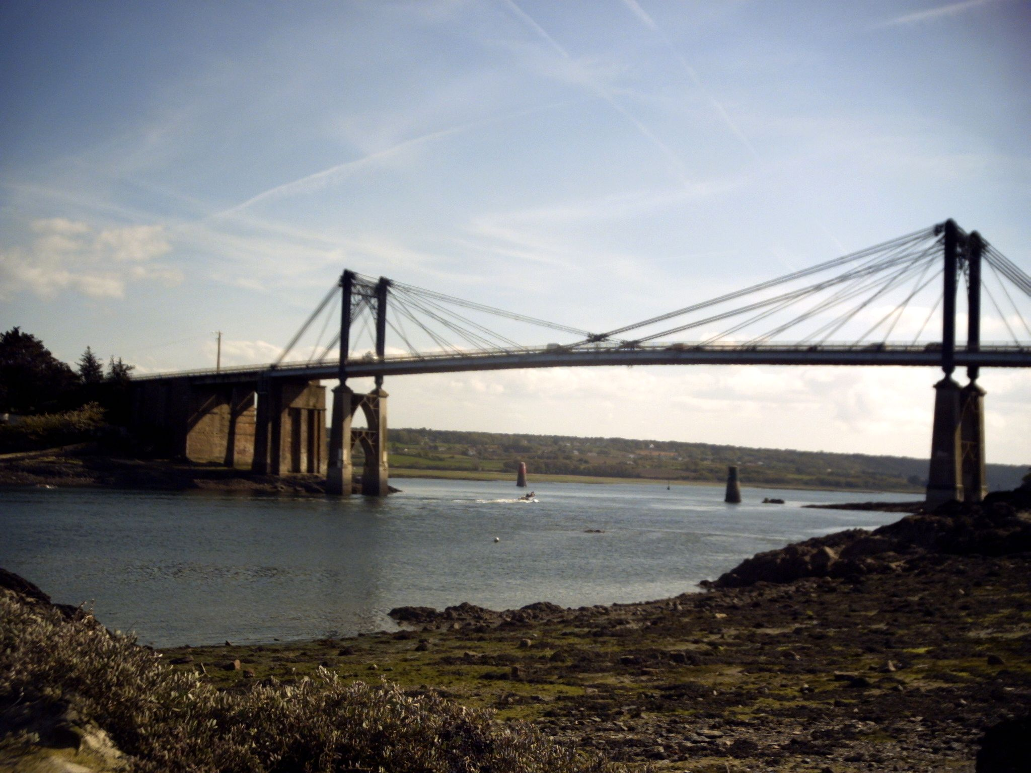 Pont de Lézardrieux, Côtes d'Armor (22). Vue du pont sur le Trieux à basse mer, prise depuis la rive gauche, côté Lézardrieux. L'autre rive est sur la commune de Paimpol, et en arrière plan sur la commune de Plourivo. Mai 2006. Auteur: Michel LEFF